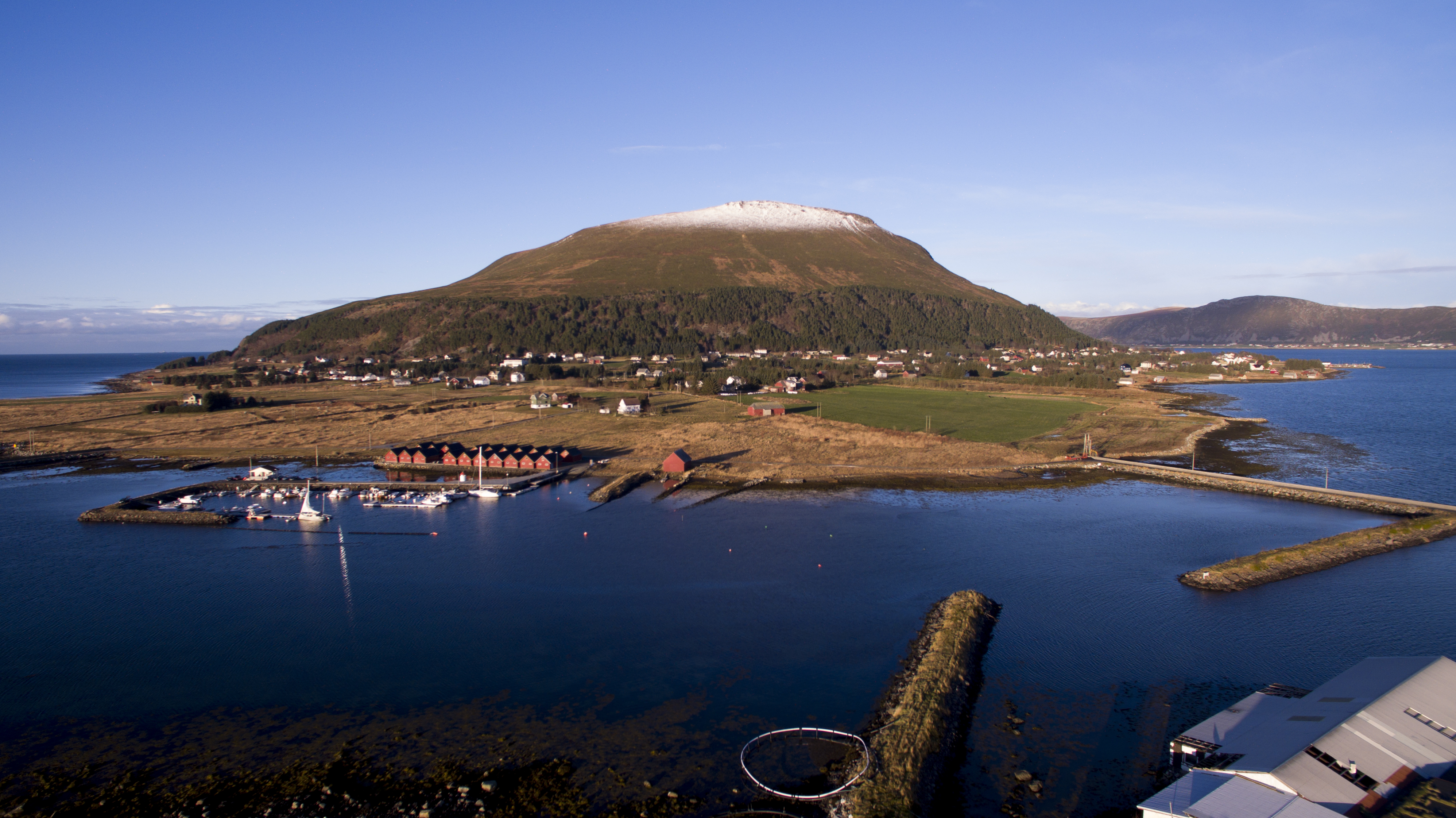 Lepsøy sett fra Sør-Øst, med Haramsøy i bakgrunnen